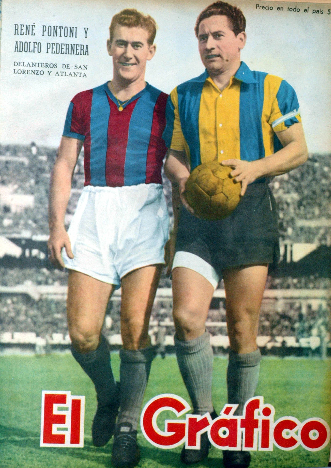 El Grafico del 18 de Julio de 1947. Edicion 1462